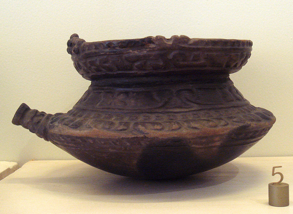 Final Jomon Jar, Kamegaoka style